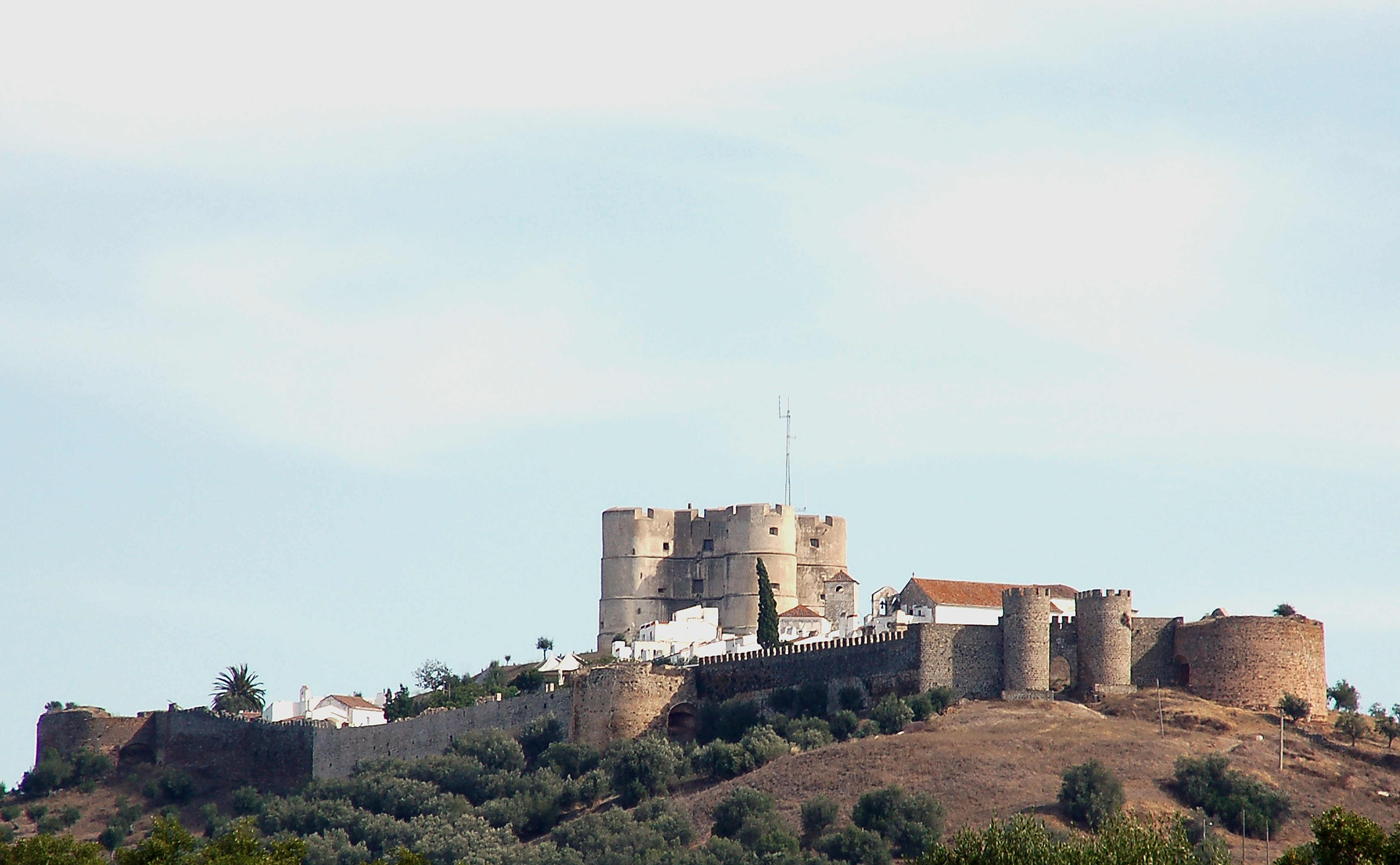 Localizado na Serra de Ossa.